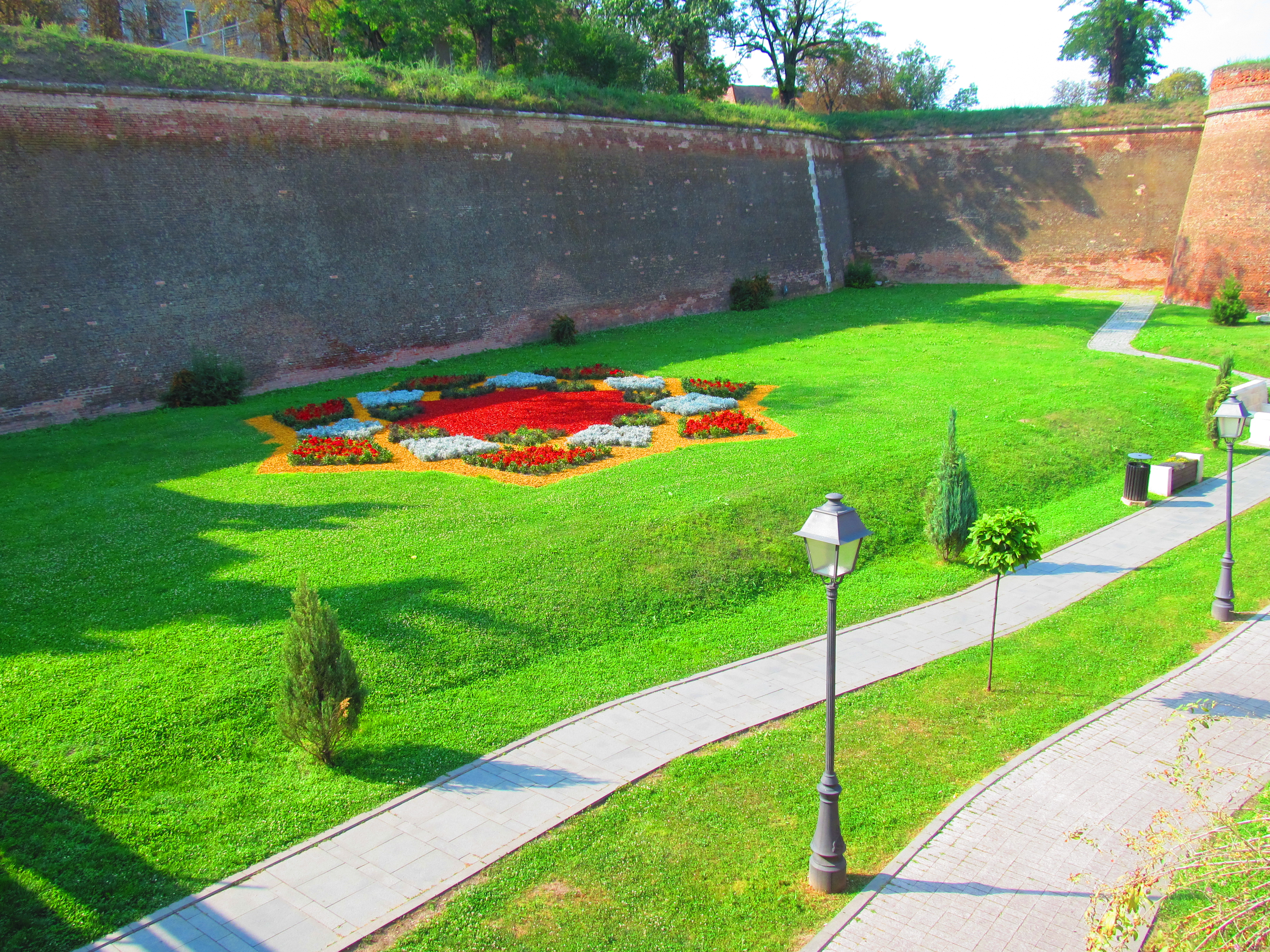 Zid de incintă 02